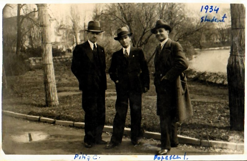 Poetul Dem Iliescu (în centru) alături de doi colegi de studenţie în parcul Cişmigiu din Bucureşti. Notele de pe fotografie îi aparţin.